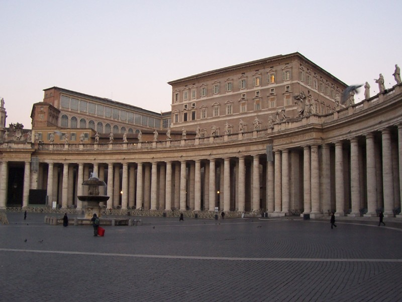 Città del Vaticano - Palazzo Apostolico all'alba